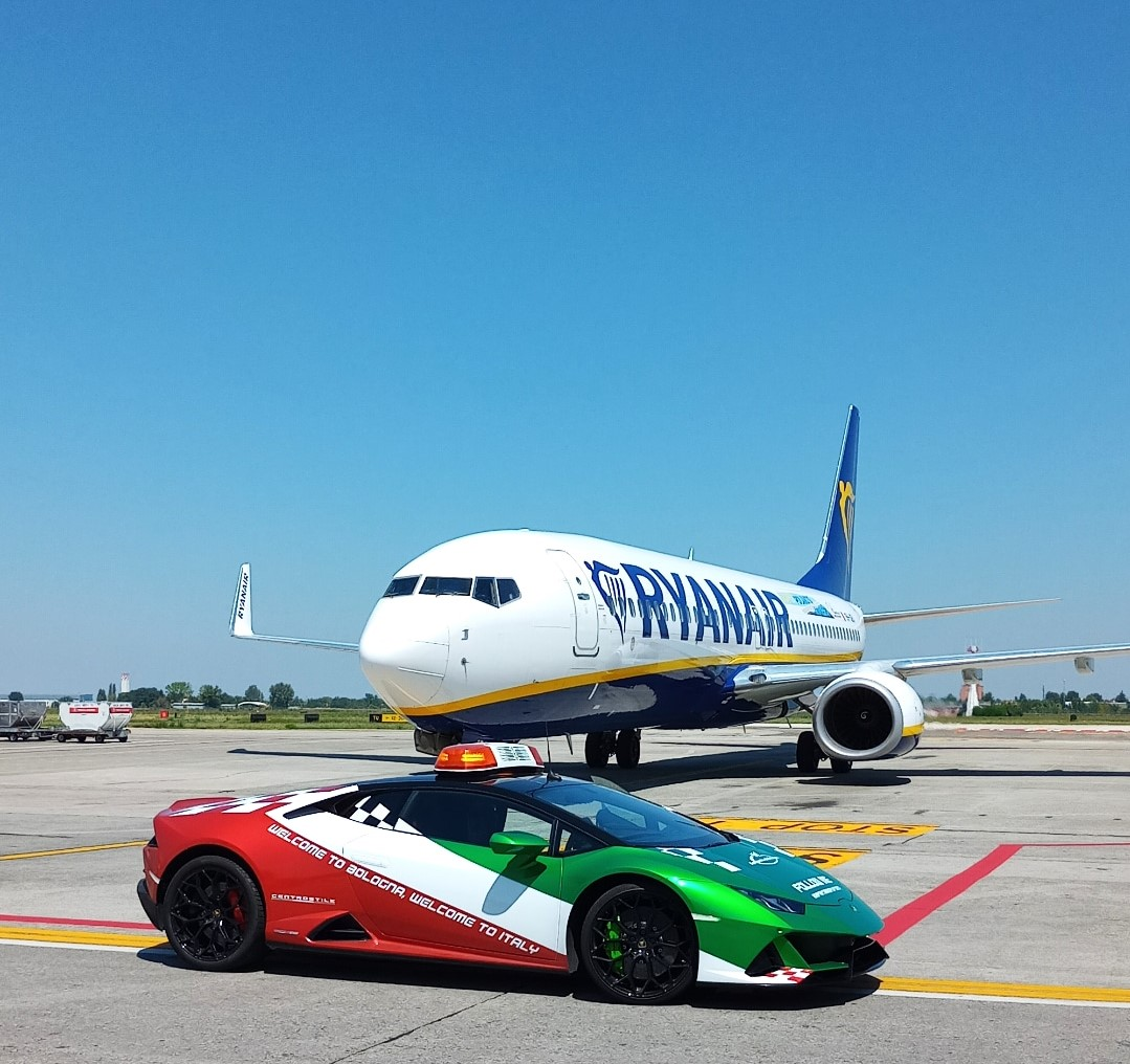 Lamborghini Huracán Evo usata come "Follow Me"